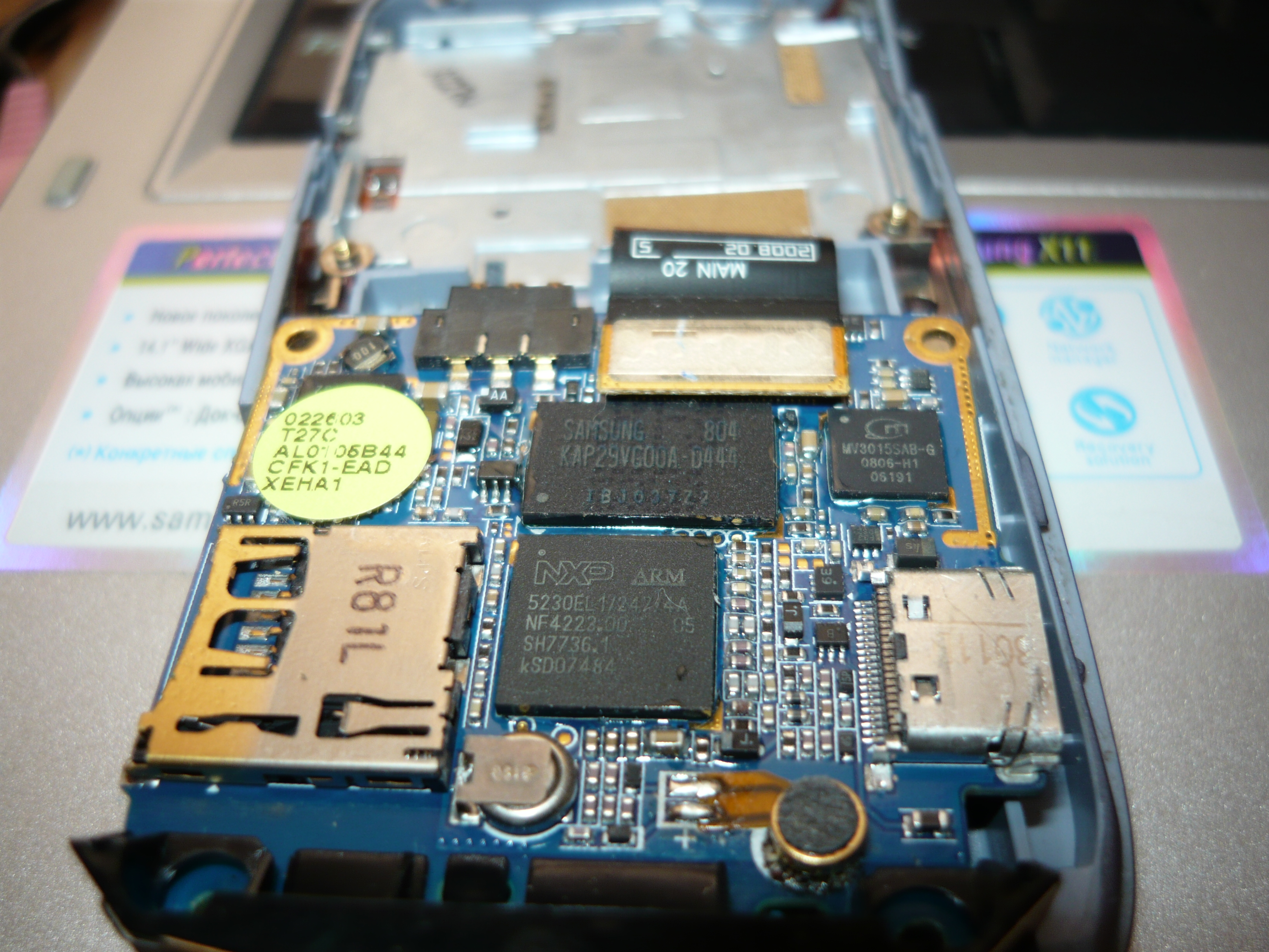 ARM процессор NXP в сотовом телефоне Samsung